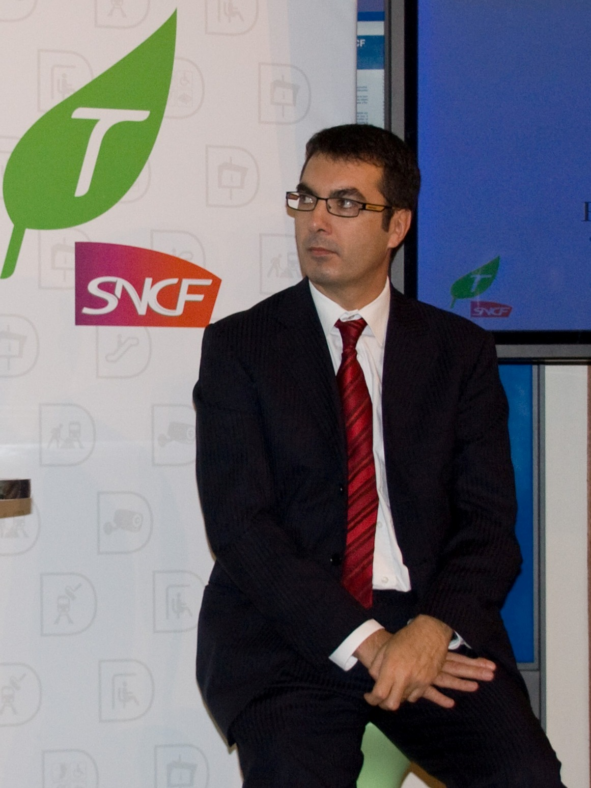 Jean-Pierre Farandou, en octobre 2008; lors d'une réunion en gare de Corbeil-Essonnes.